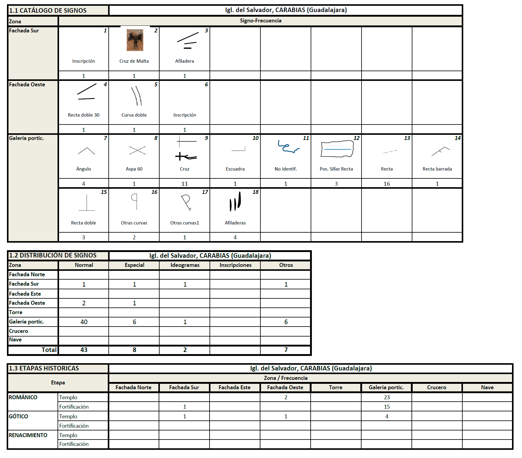 Iglesia del Salvador, Carabias (Guadalajara) España, románica s XIII. Catálogo de Marcas de cantería.